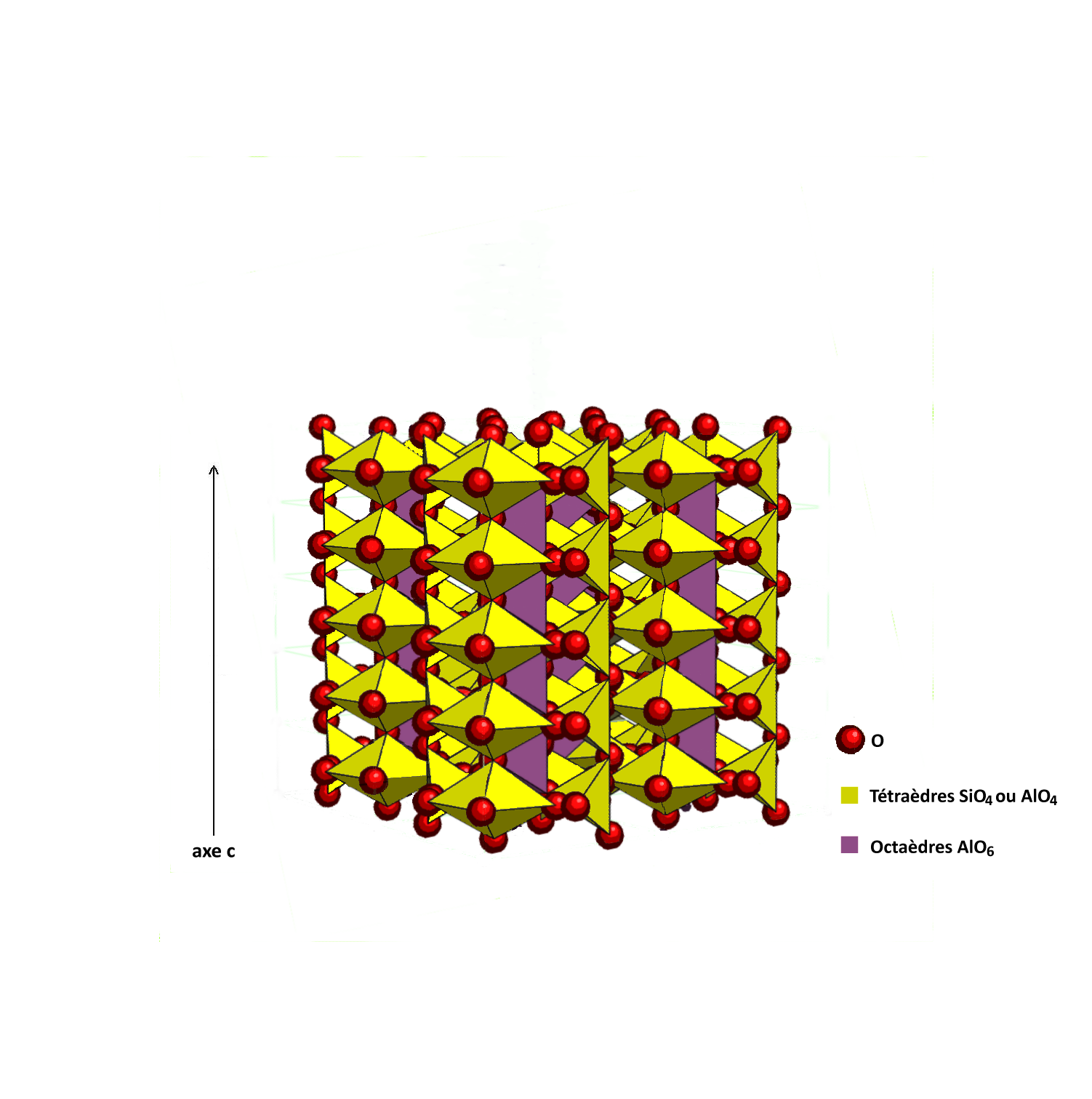 Structure de la mullite. Représentation en trois dimensions. Ithink this is incorrect. I believe octahedron and tetrahedron are mixed. I believe AlO3 should be octahedron, AlO4 should be tetrahedron